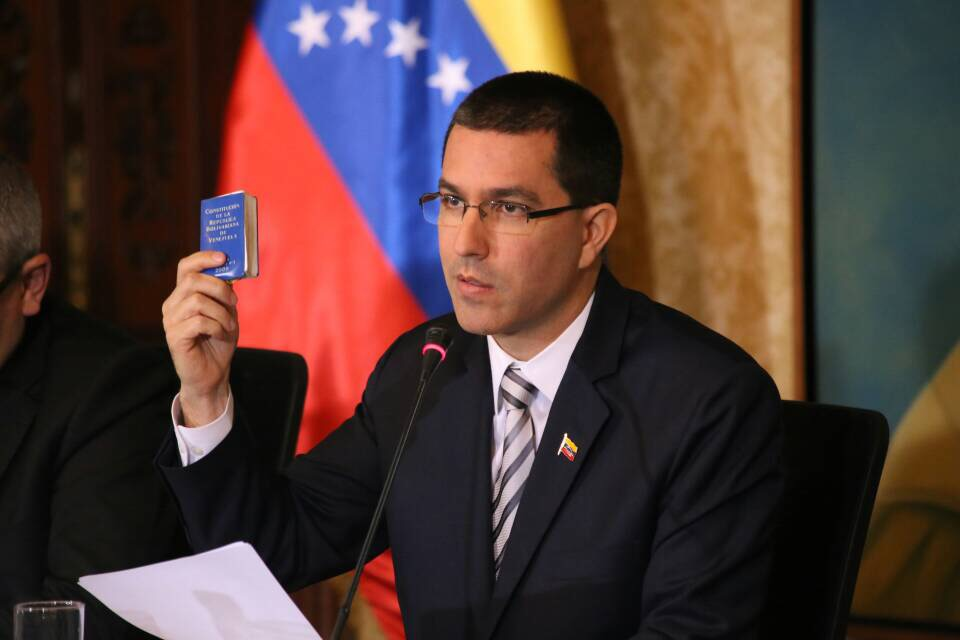 Jorge Arreaza, Canciller de la República Bolivariana de Venezuela, encabeza una reunión con el cuerpo diplomático acreditado en el país.